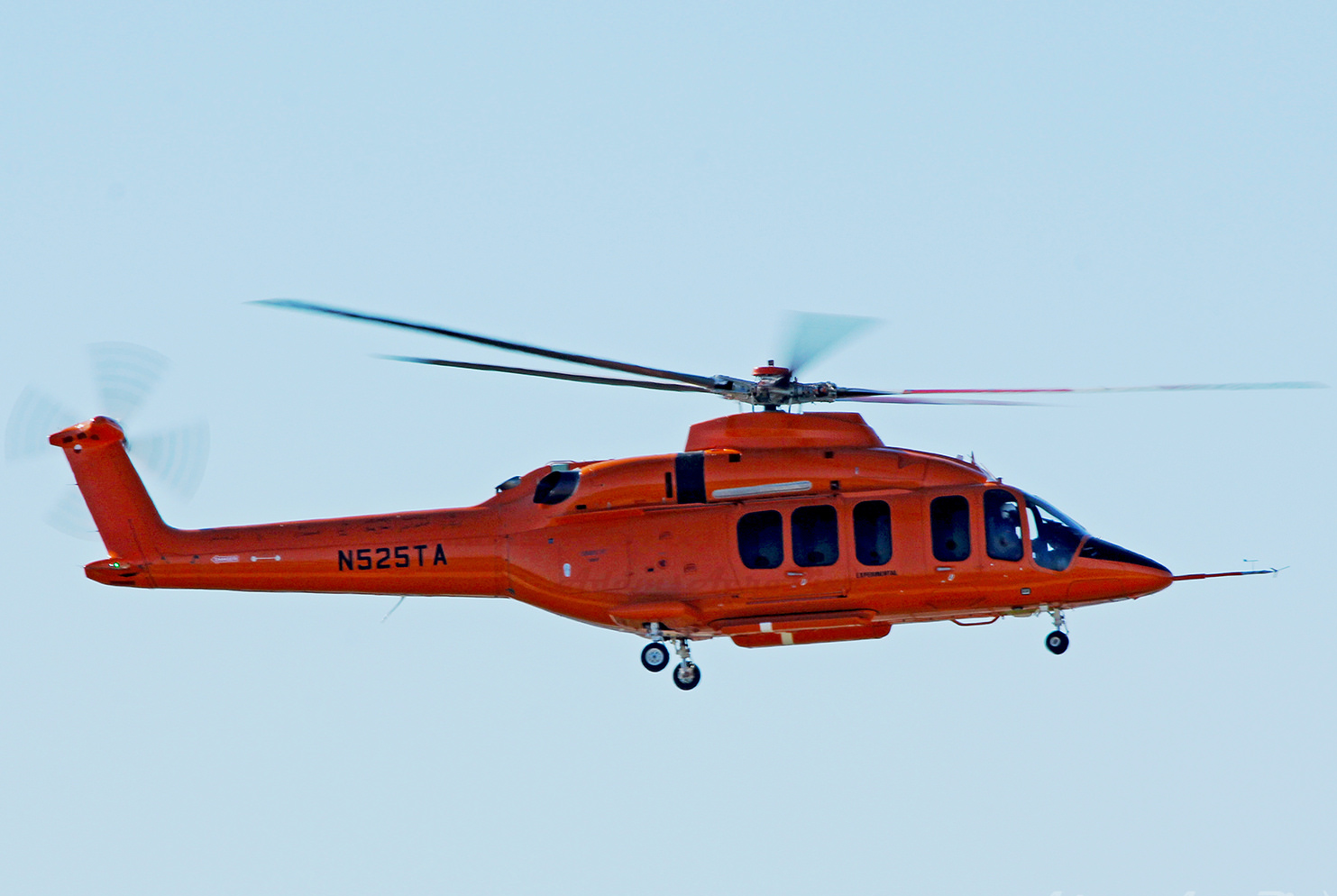 525 GKY